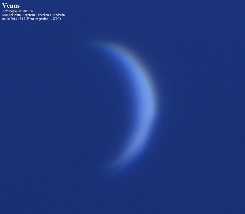 El planeta Venus observado desde un telescopio, y registrado de día. Crédito: Esteban J. Andrada